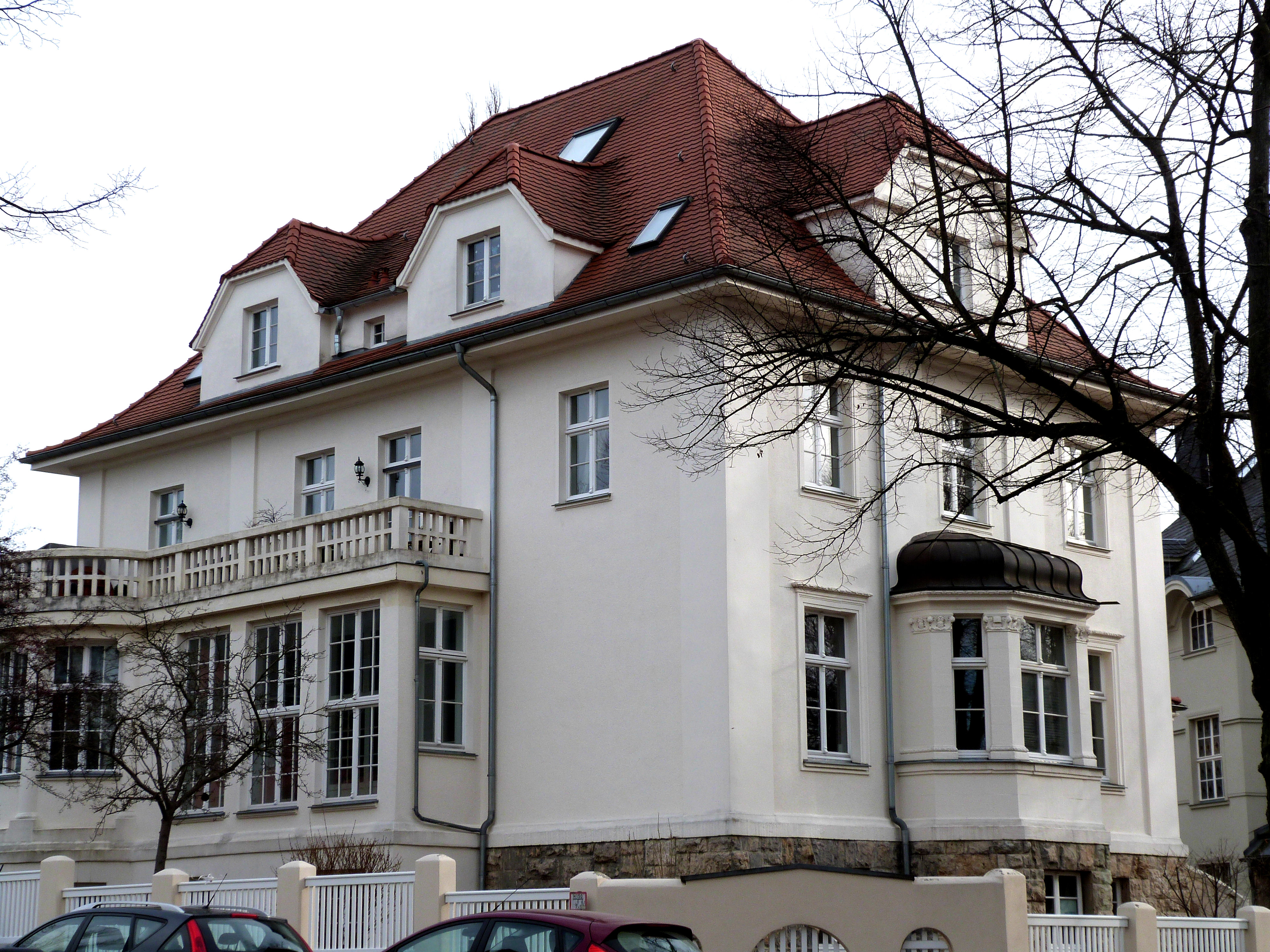 Villa Rathenauplatz 11, Halle (Saale)